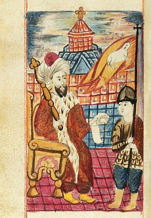 "Григор Магистрос и Мануче", миниатюра 18 века